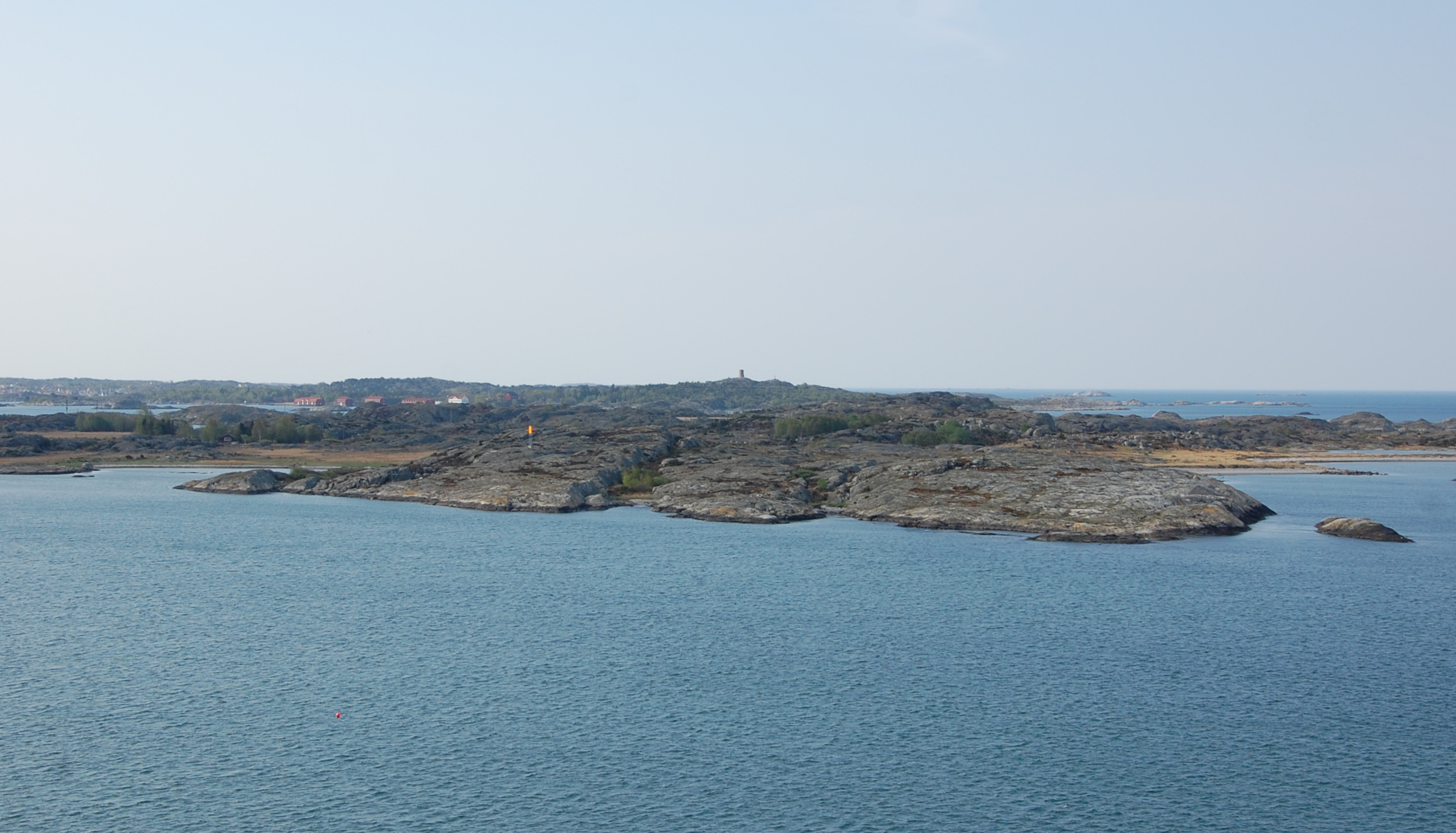 Insel im Schärengarten vor Göteborg